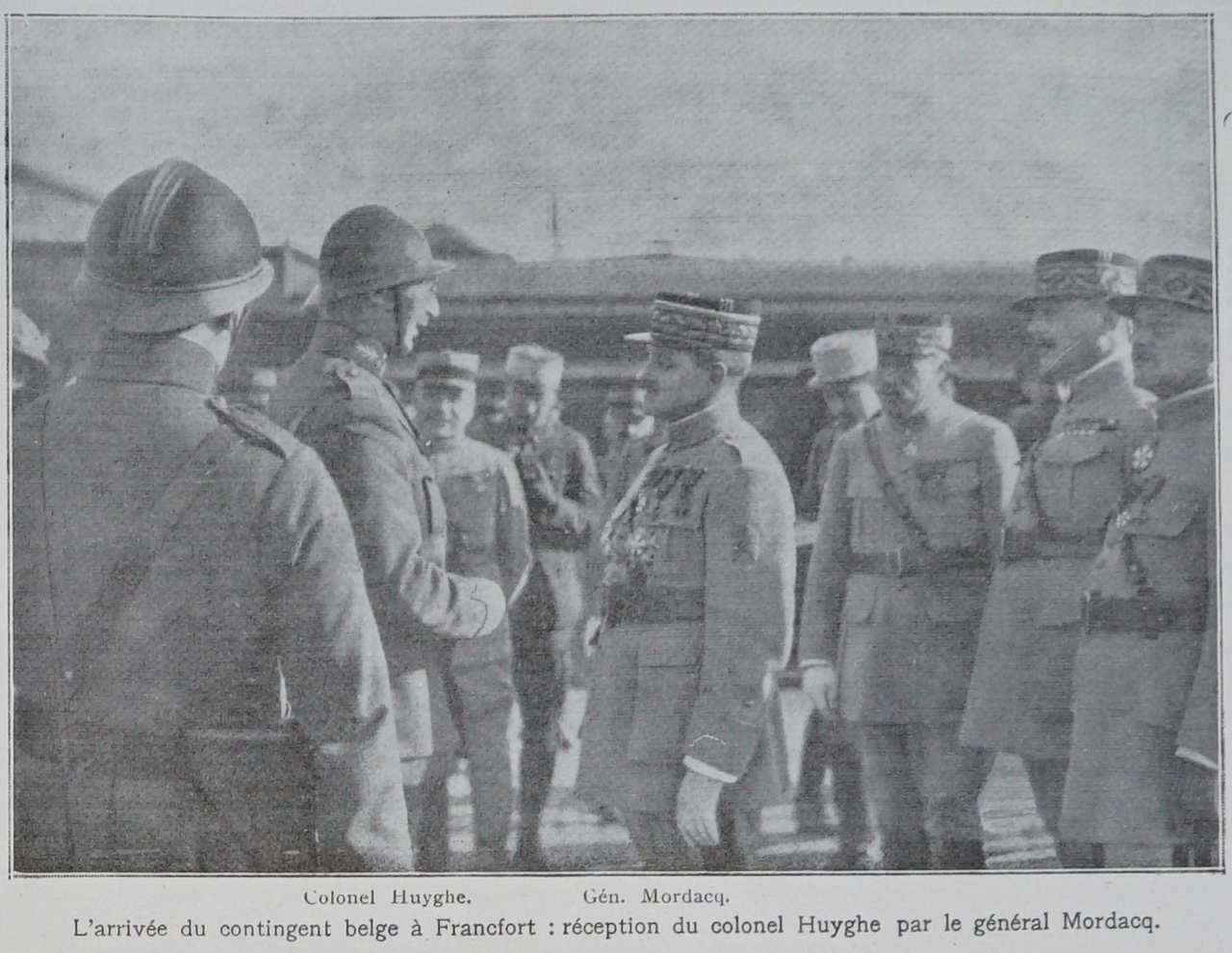 tiré du journal l'Illustration de 1920.